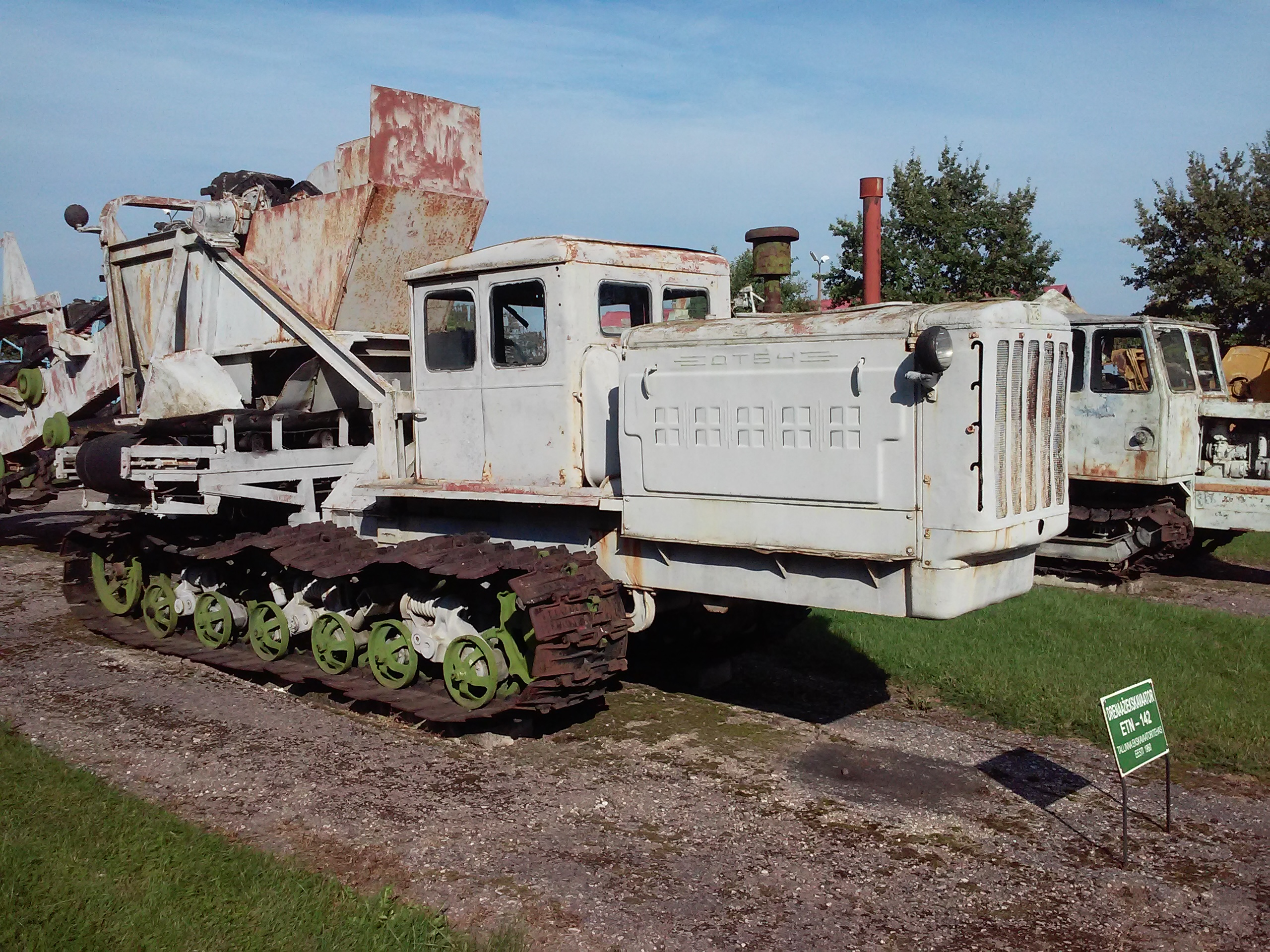 ЭТН-142